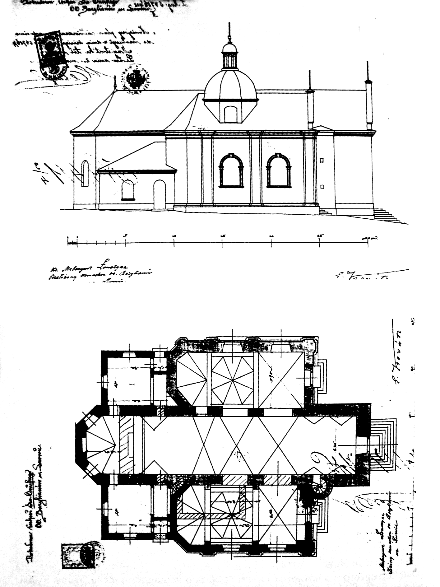 План добудови додаткової нави церкви святого Онуфрія у Львові (1902). Архітектор Едгар ковач.